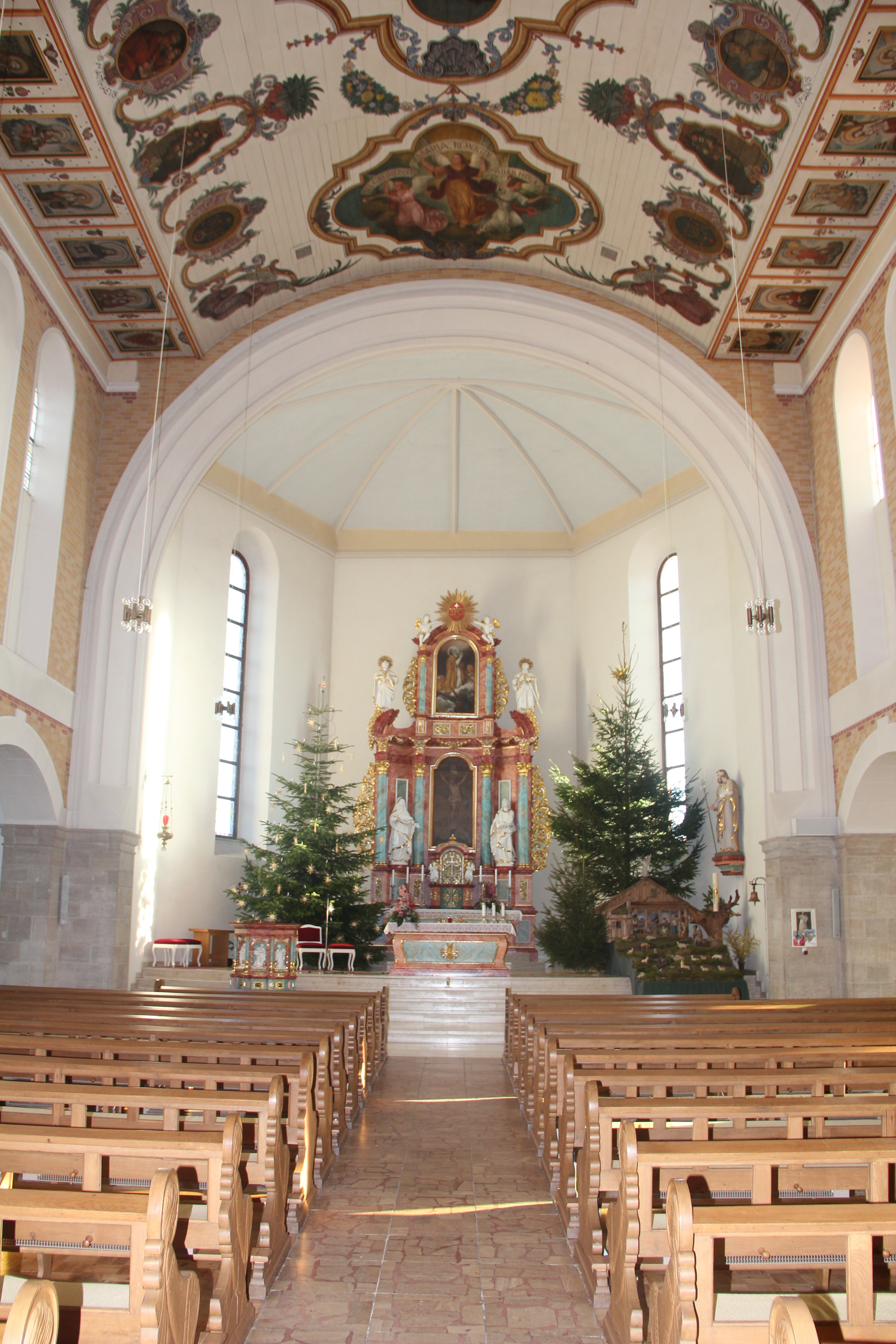 Innenansicht der Kirche St. Nikolaus in Siemerode